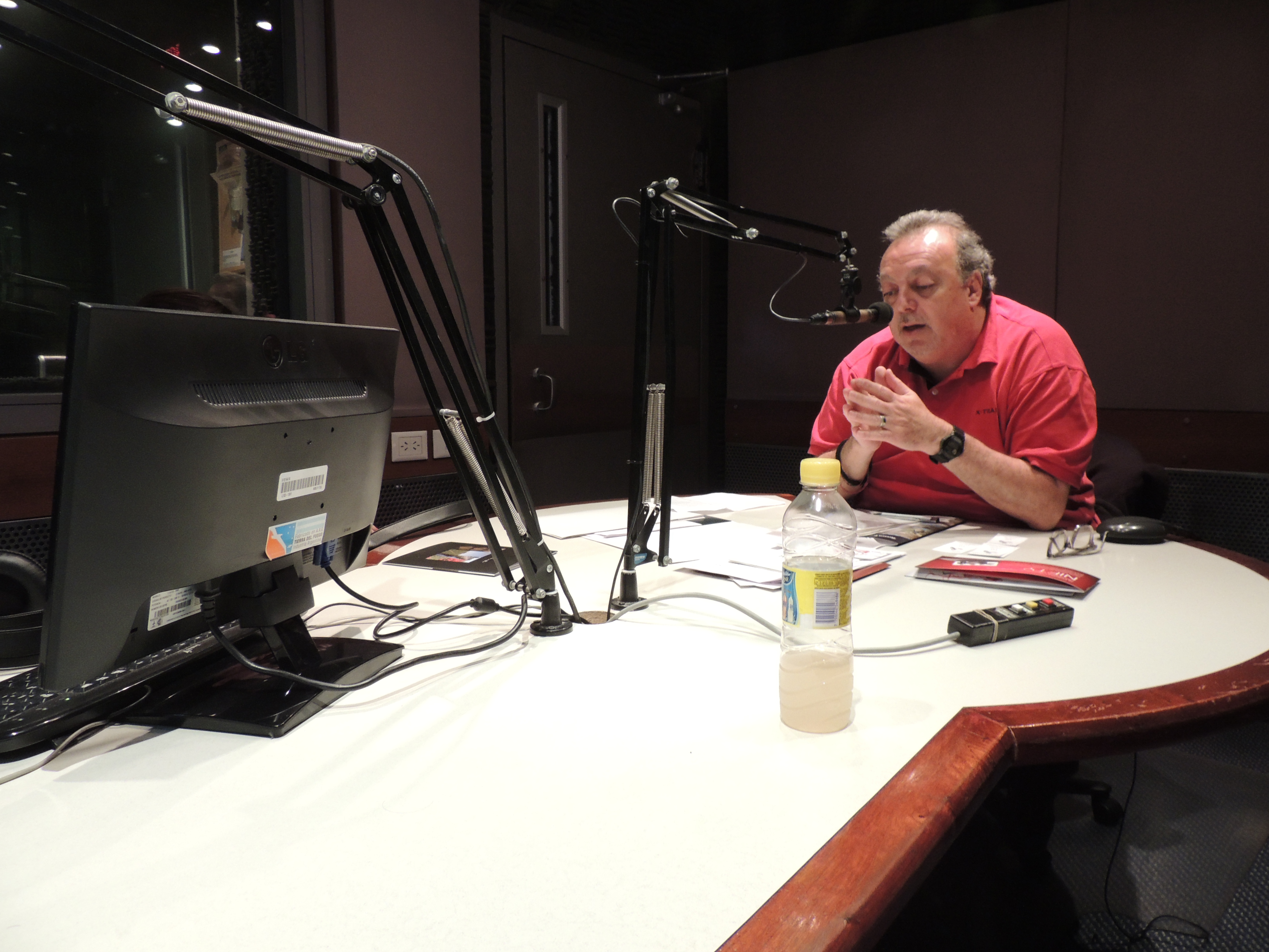 Estudios de Radio Palermo, en Capital Federal, Argentina